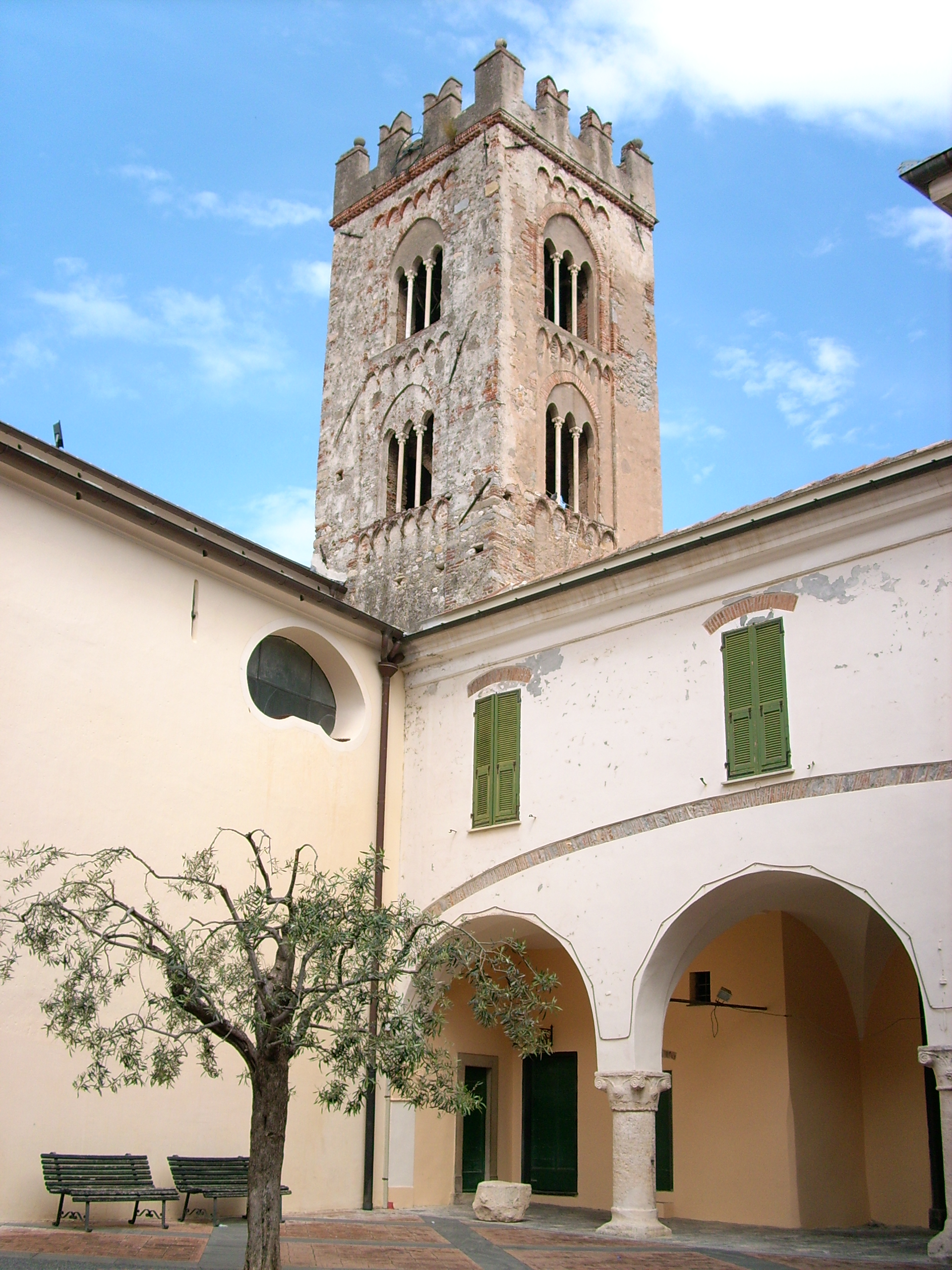 Toirano, Liguria, Italia